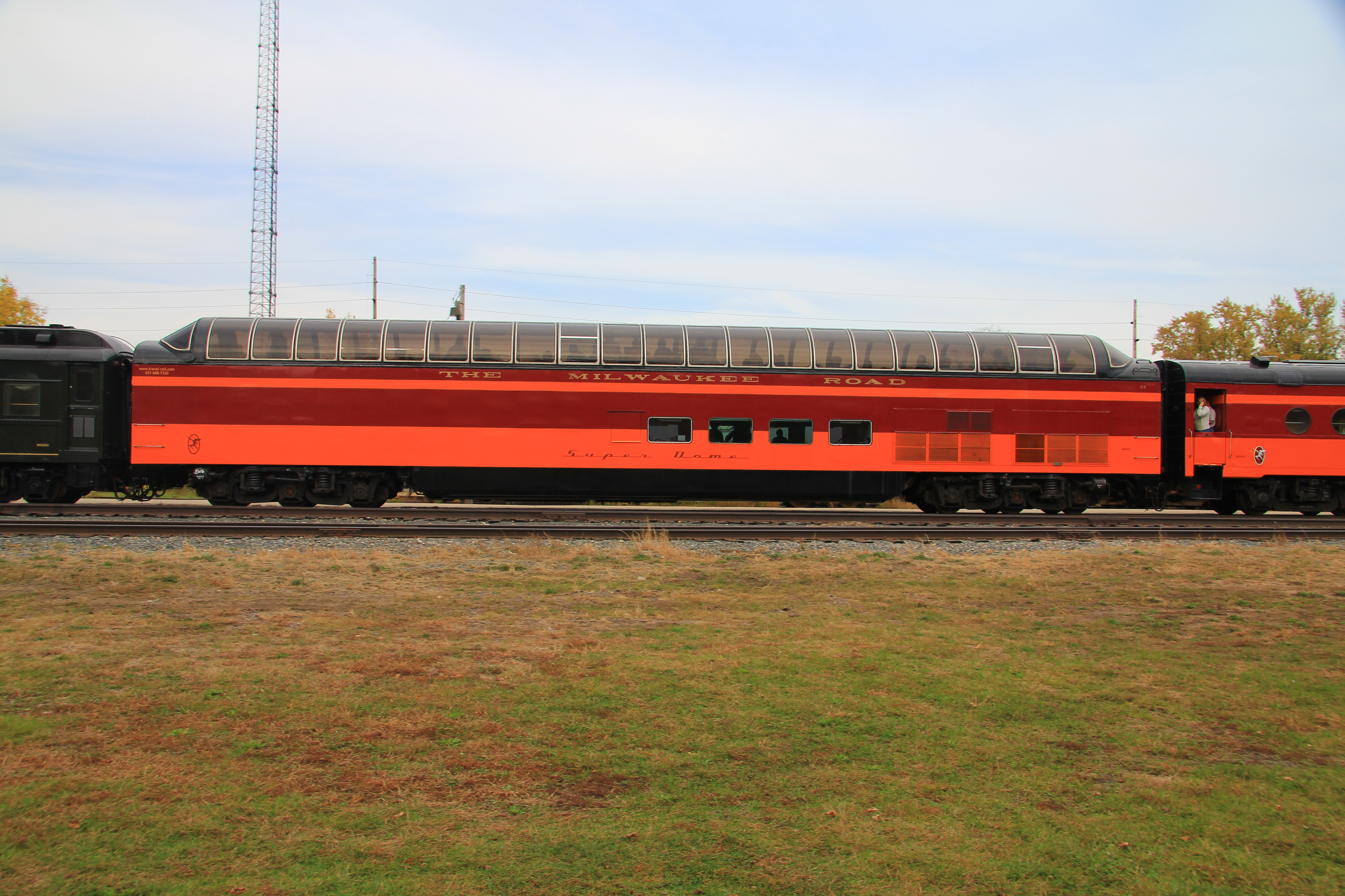 Super Dome car.